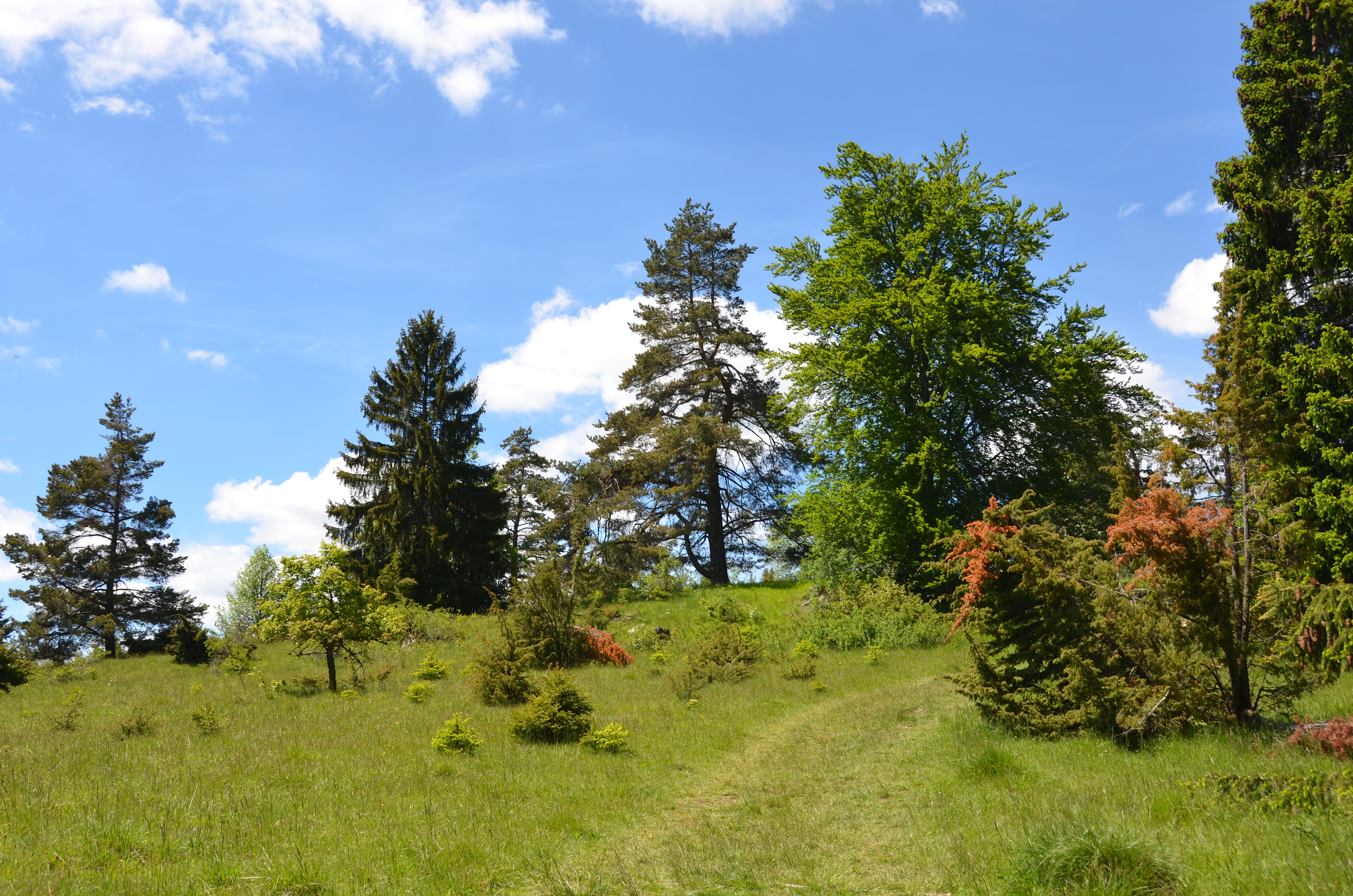 Landschaftsschutzgebiet Albstadt-Bitz, Vogelschutzgebiet Südwestalb und Oberes Donautal und Naturraum Hohe Schwabenalb